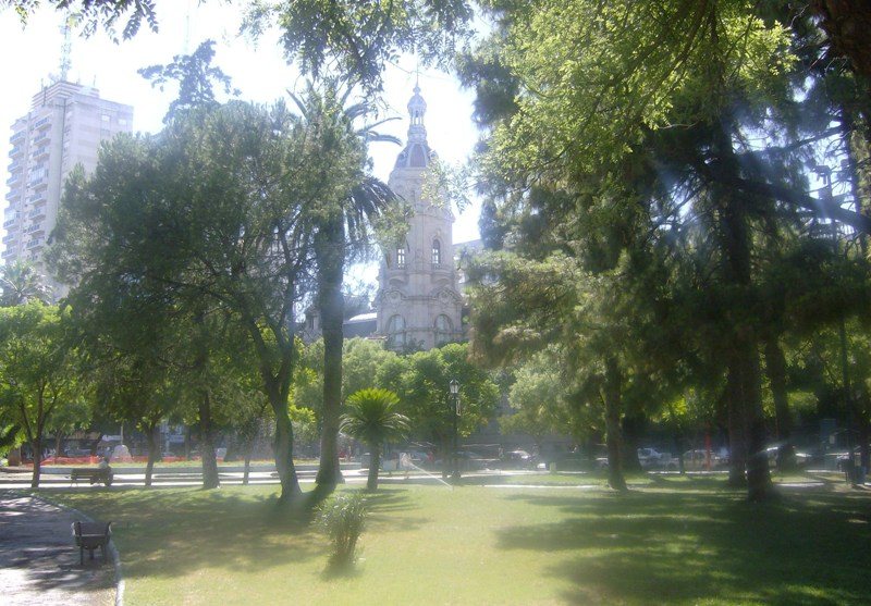 Cúpula de la municipalidad de Bahía Blanca vista desde Plaza Rivadavia